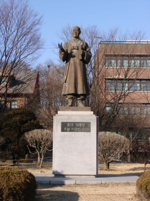 배재학당의 졸업생이자 대한민국 최초의 대통령인 이승만 박사의 동상.